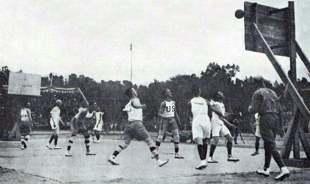 L'équipe des États-Unis de basket-ball, victorieuse des Jeux Interalliés en juillet 1919.